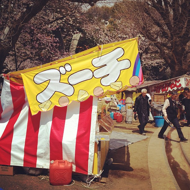 ズーチ チーズ Cheese